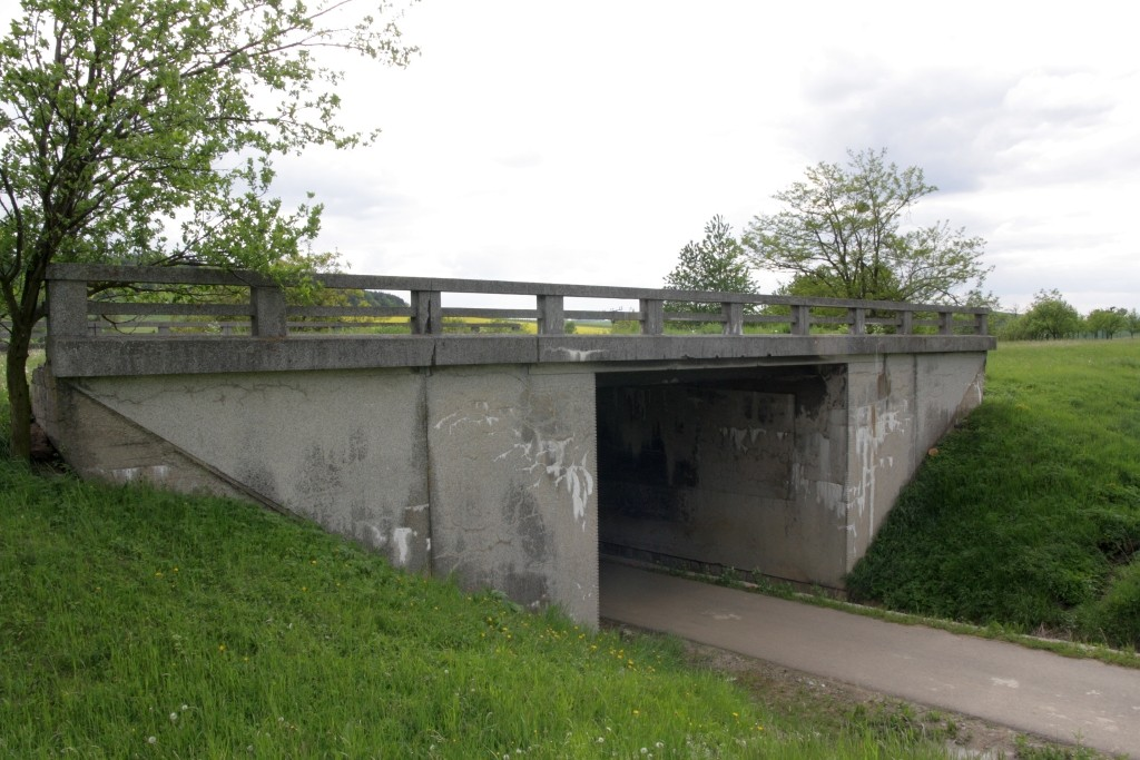 Dálniční nadjezd za obcí Zastřizly